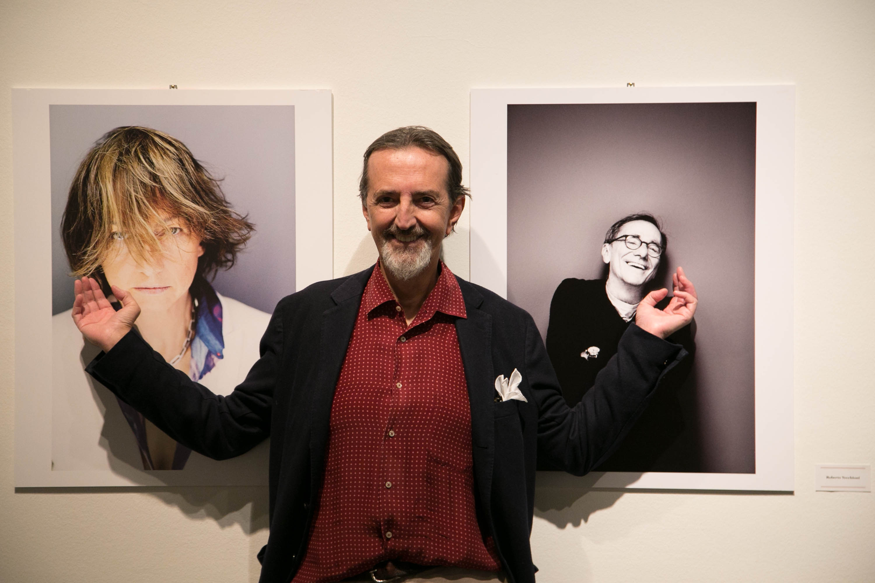 2017 02 03 Pizzarotti Ferraris mostra le 100 facce della musica italiana Giovanni Gastel-1